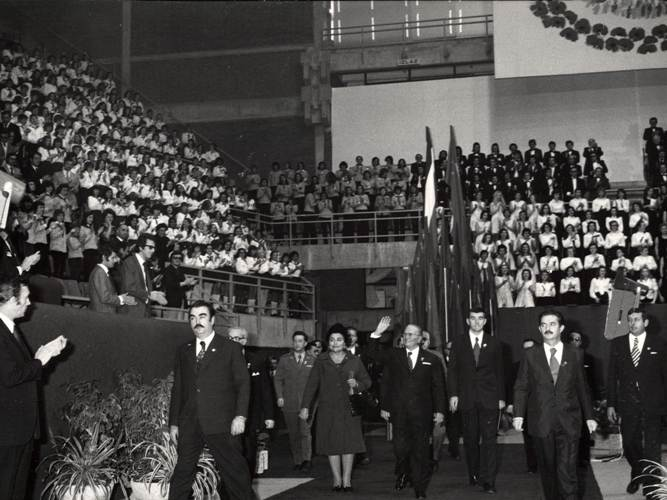 Tito na proslavi 30 godina oslobođenja Beograda 20. oktobra 1974.